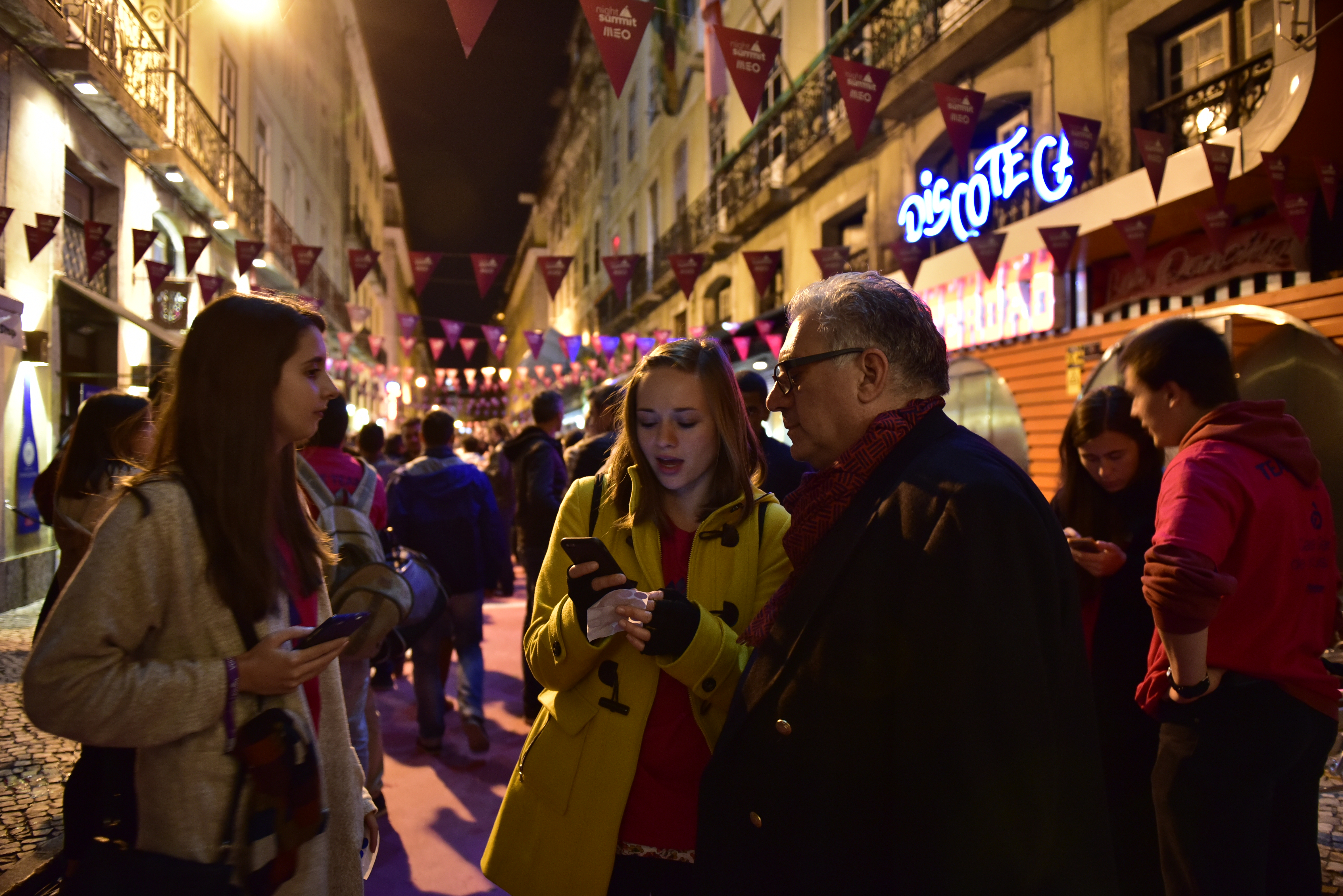 _DSC8225